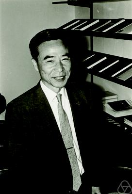 Foto di Gisiro Maruyama